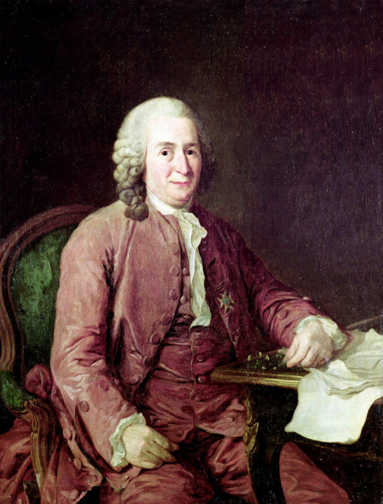 En 1775, portant la croix de l'ordre de l'Etoile du Nord de Suède. Collection de l'Académie Royale des Sciences de Stockholm